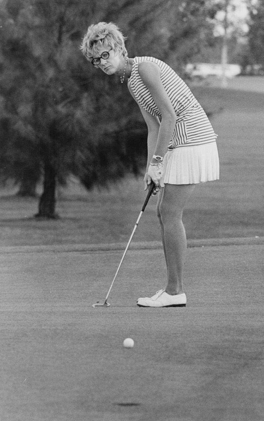 Carol Mann